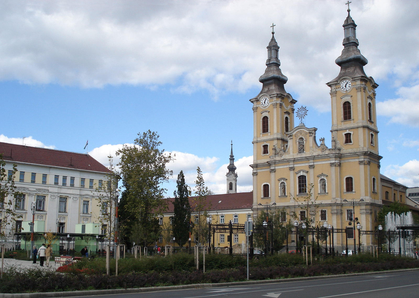 Minorita templom (Miskolc, Hősök tere 1.) This is a photo of a monument in Hungary. Identifier: 2944